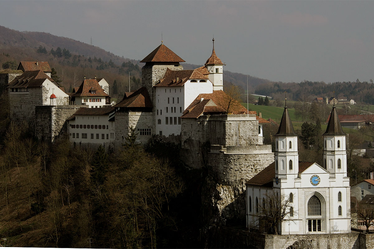 Burg von Aarburg